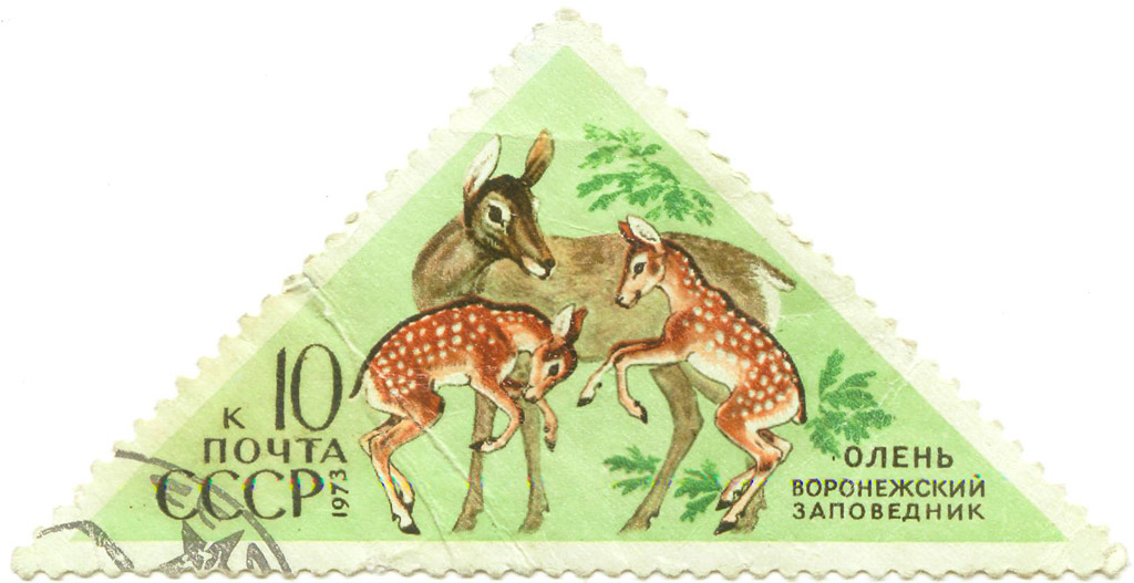 Марка. Олень. Воронежский заповедник 197